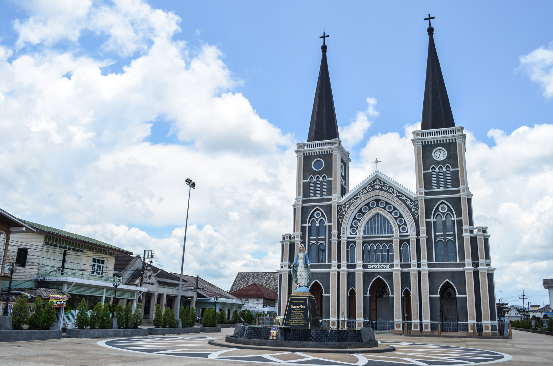 วัดโรมันคาทอลิก